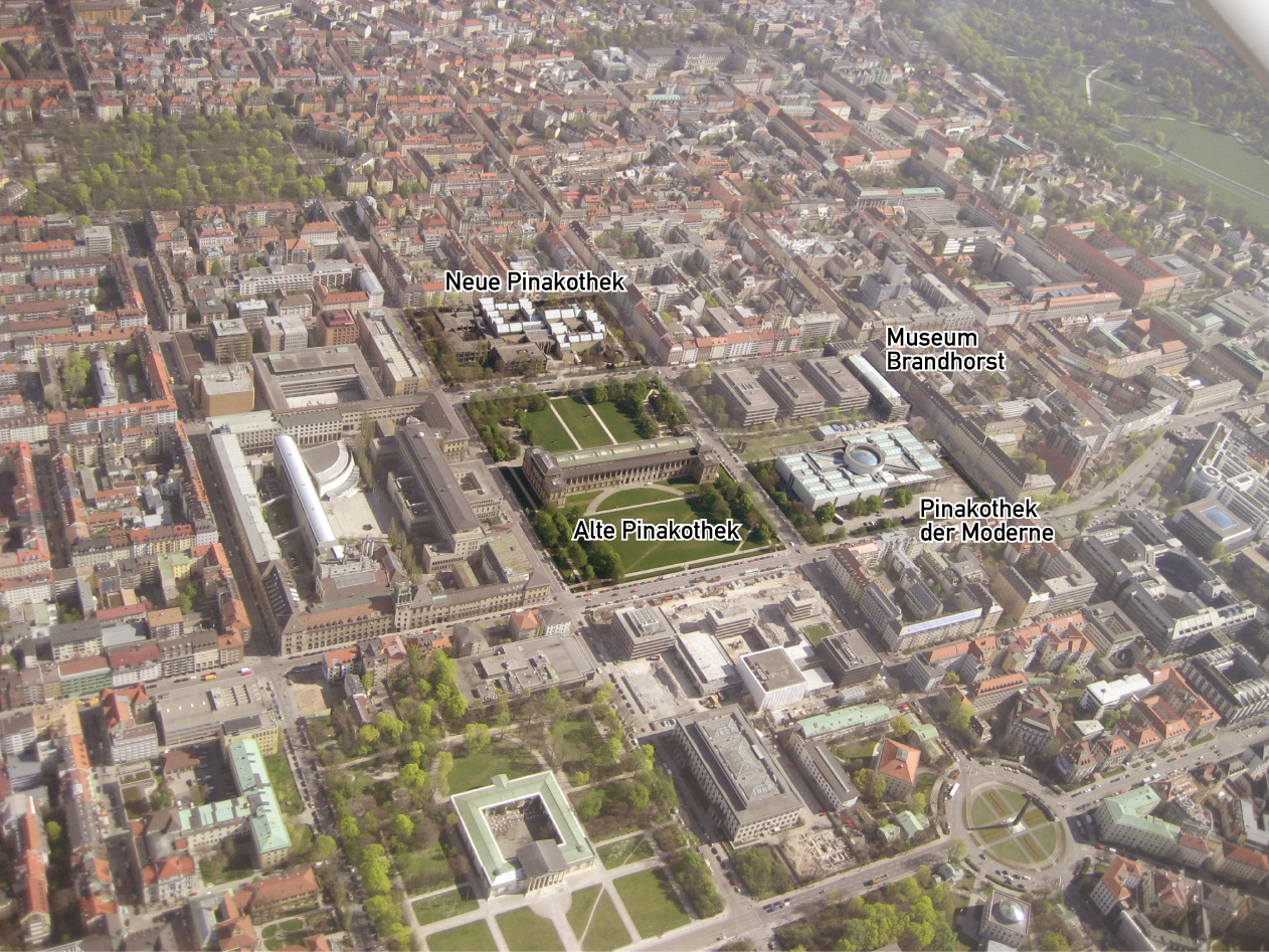 Luftbild der Pinakotheken und der Sammlung Brandhorst in der Münchner Maxvorstadt (mit Hinweistexten)